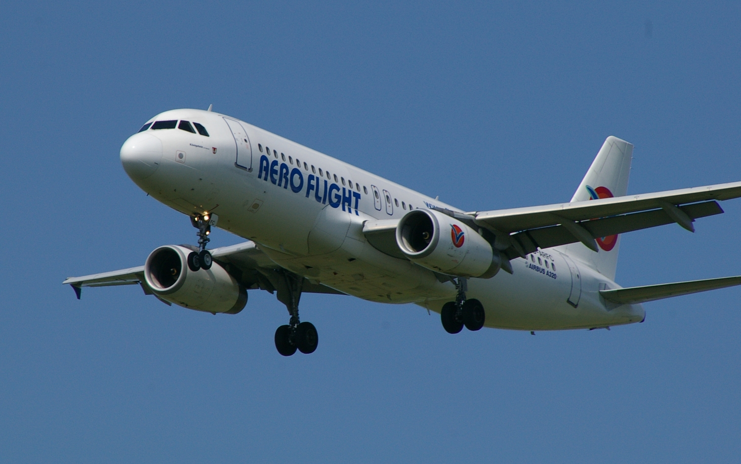 Airbus A320-232 der Fluglinie Aero Flight im Juni 2005.